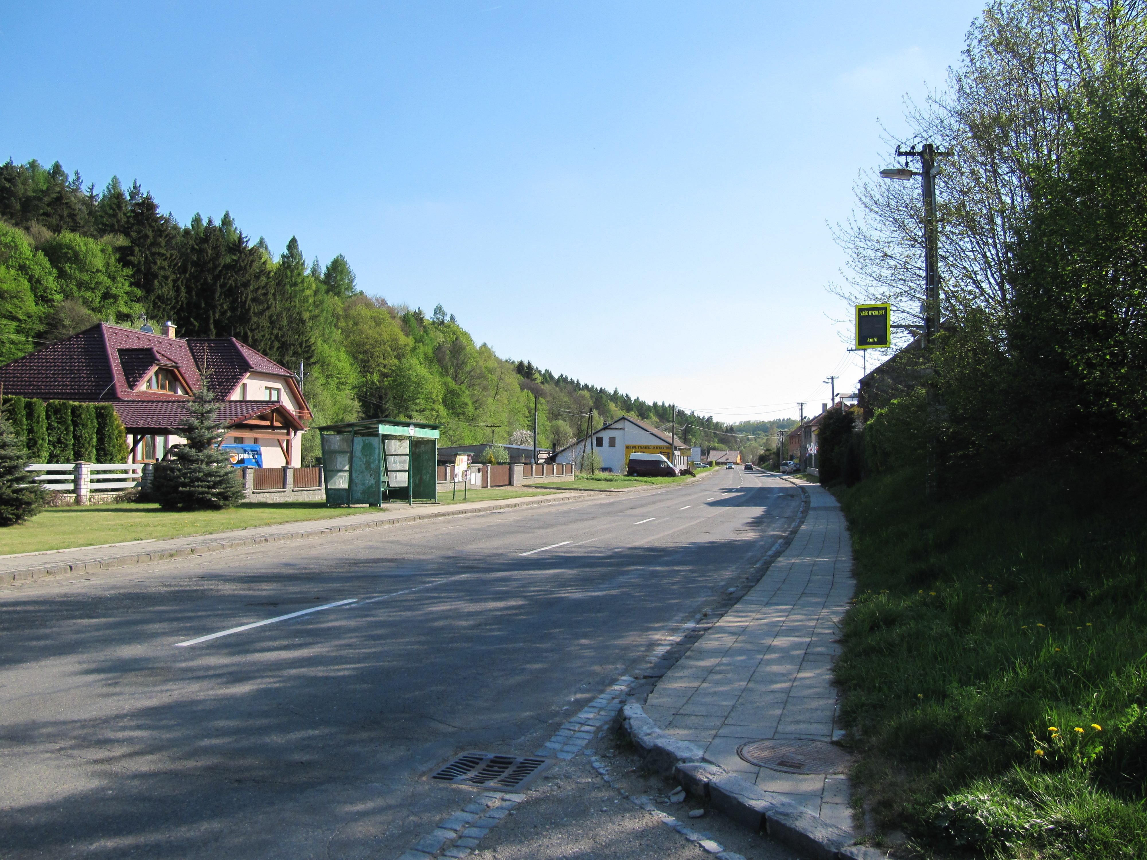 Šarovy